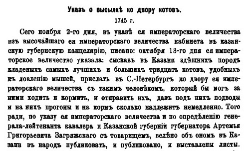 Листки из записной книжки «Русской старины»: Указы императрицы Елизаветы Петровны